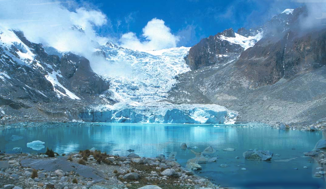 Vista de la laguna Glaciar ubicada en el nevado Illampu, Bolivia.